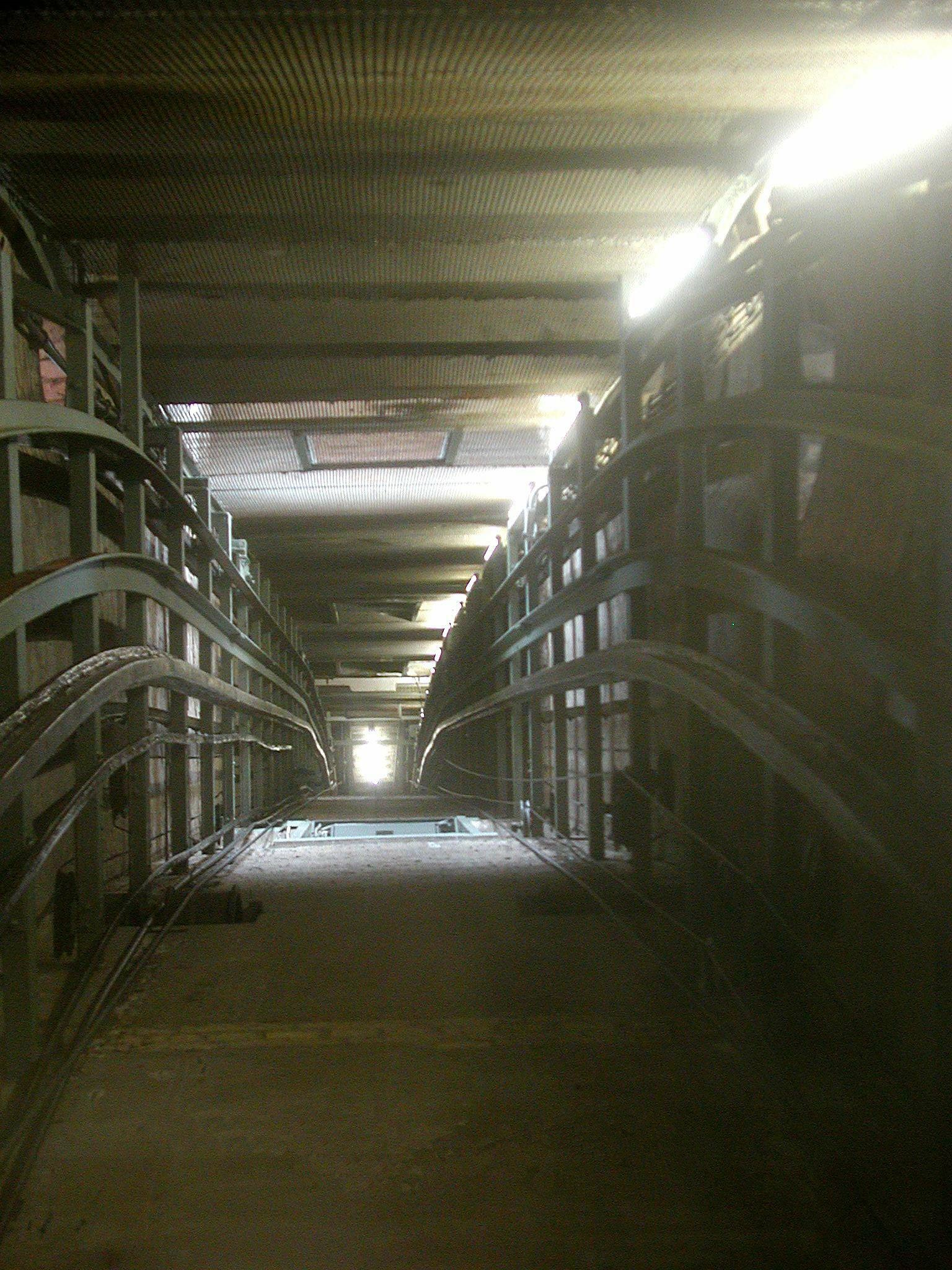 Bogenaufzug im Neuen Rathaus in Hannover, Niedersachsen, Deutschland. Blick vor der Sanierung vom Fahrkorbdach aus senkrecht nach oben in den Fahrschacht.